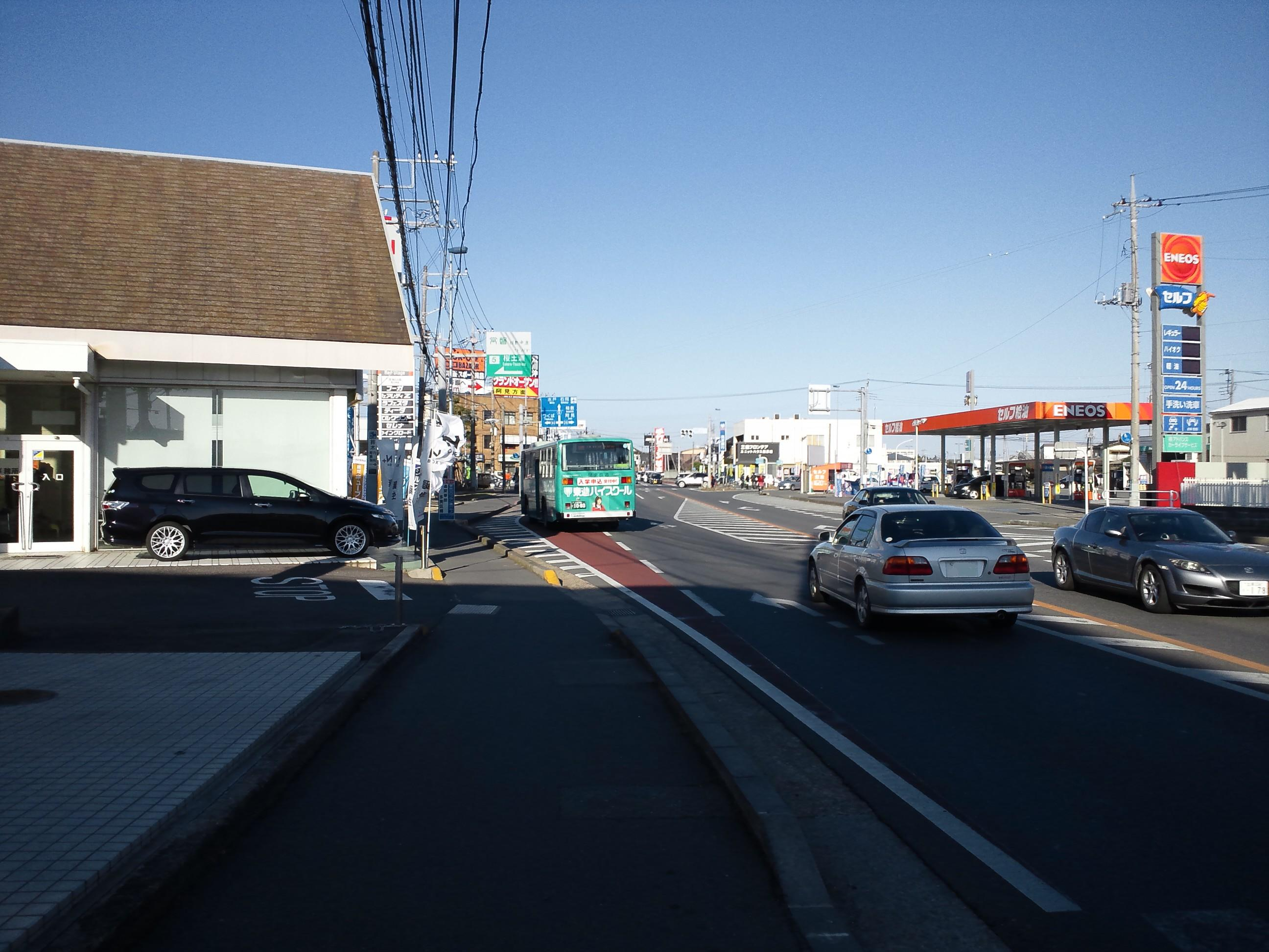 土浦市中村南